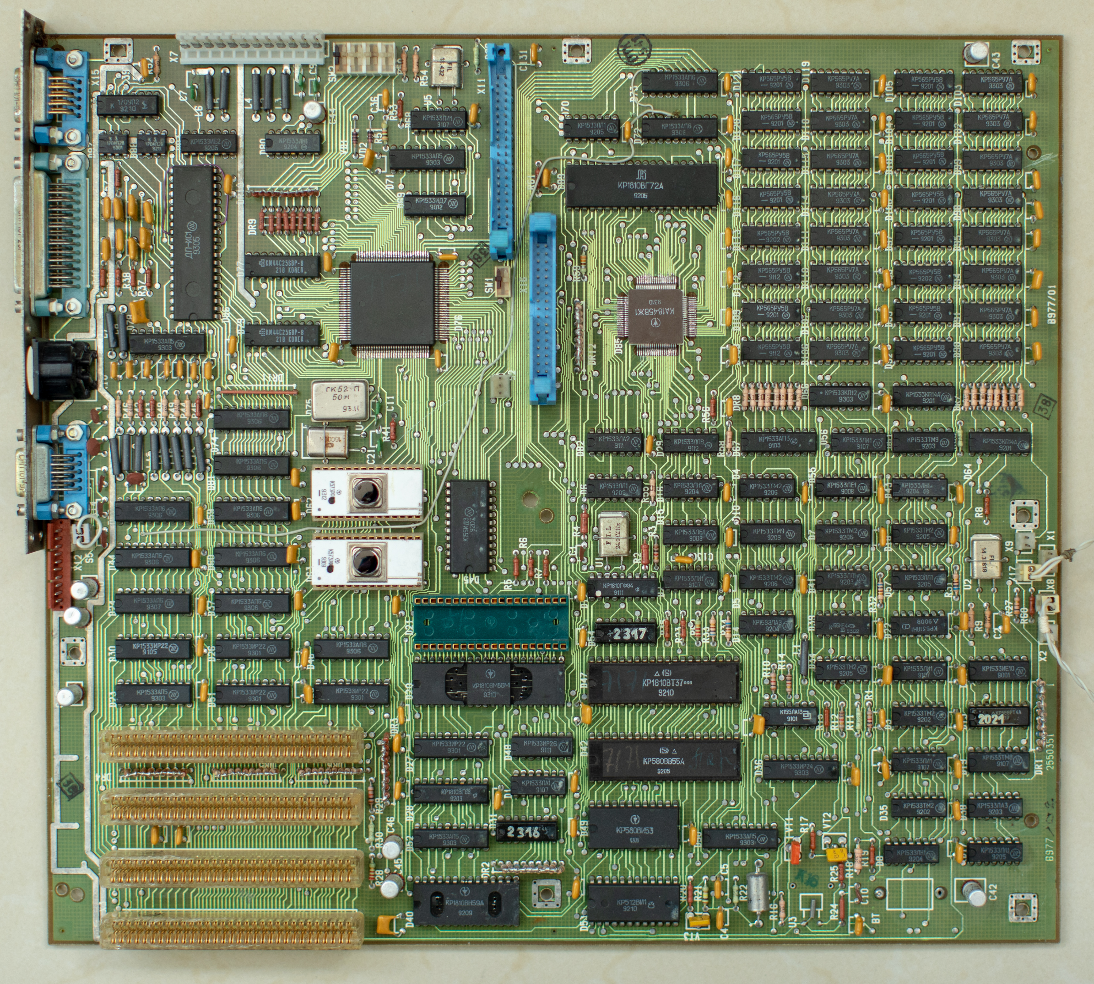 Материнская плата ПК "Поиск-3" производства НПО "Электронмаш", Украина, СССР